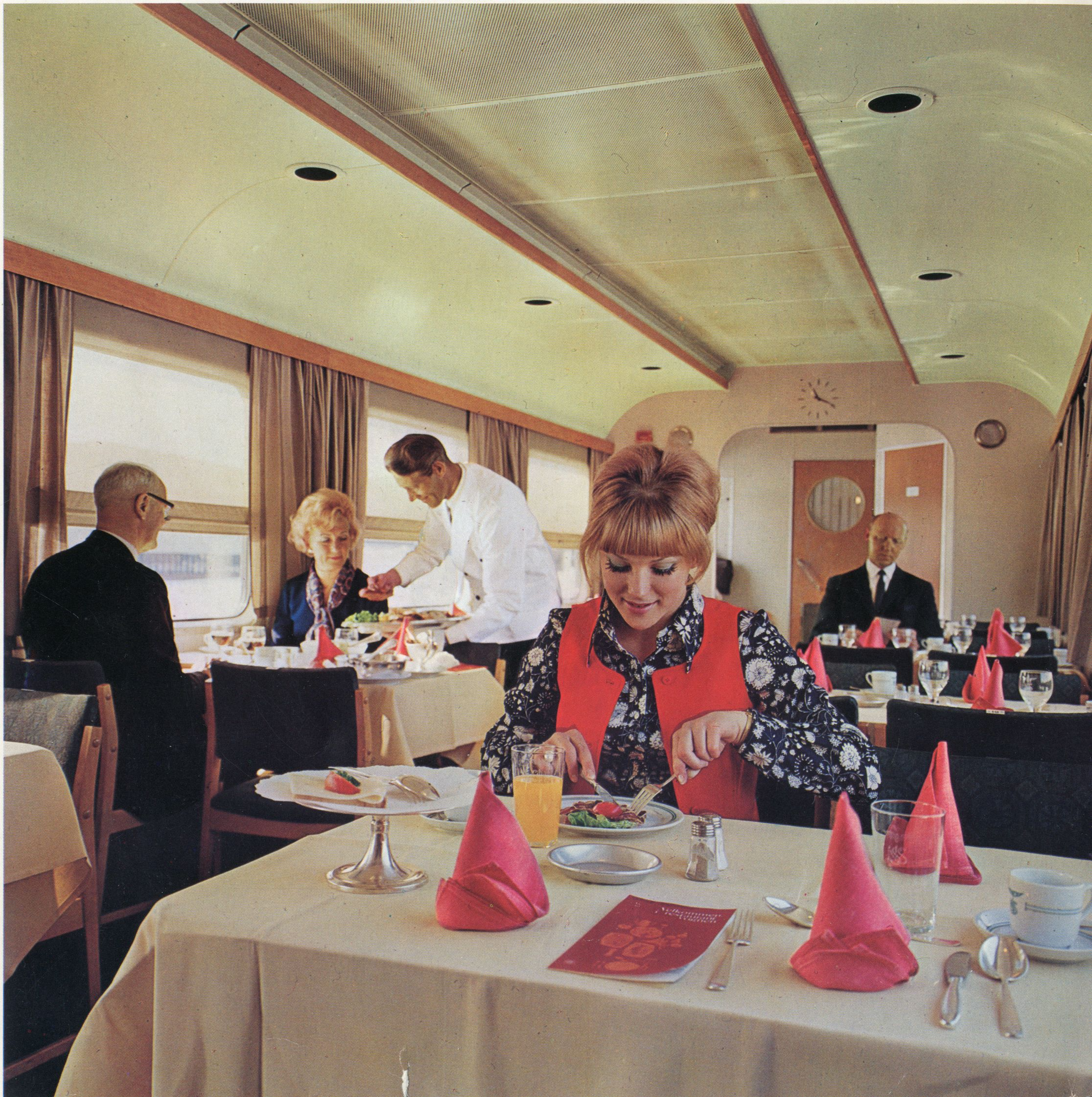 Flott oppdekning på toget. Slik kunne du innta et måltid om bord på NSBs tog for noen tiår siden. Her ser vi interiør fra en luftkondisjonert spisevogn i stål fra togtypen R1. Hva husker du fra serveringen på togene før i tiden? Hva pleide du å spise når du reiste med tog? Bildet er fra arkivet etter Norsk Spisevognselskap (PA-1528, Ua1_6_20). Publisert som en del av prosjektet #arkivsommer sommeren 2014.